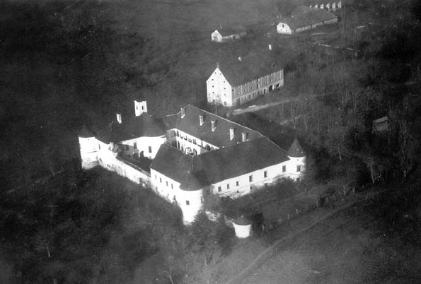 Slika Novih Dvora Cesargradskih (now Novi Dvori Klanječki) iz Zraka, godina 1939